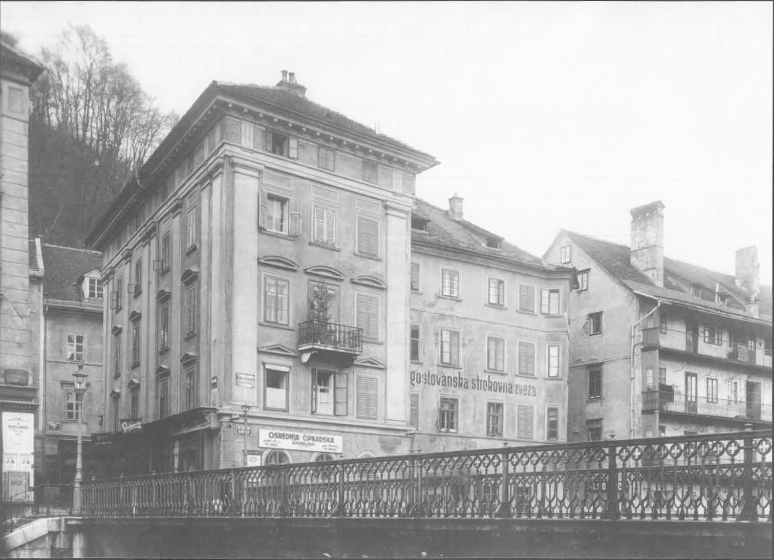 Čevljarski most in stavba Jugoslovanske strokovne zveze 1925